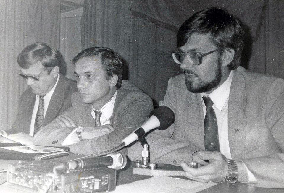 Одарич - член Народного руху